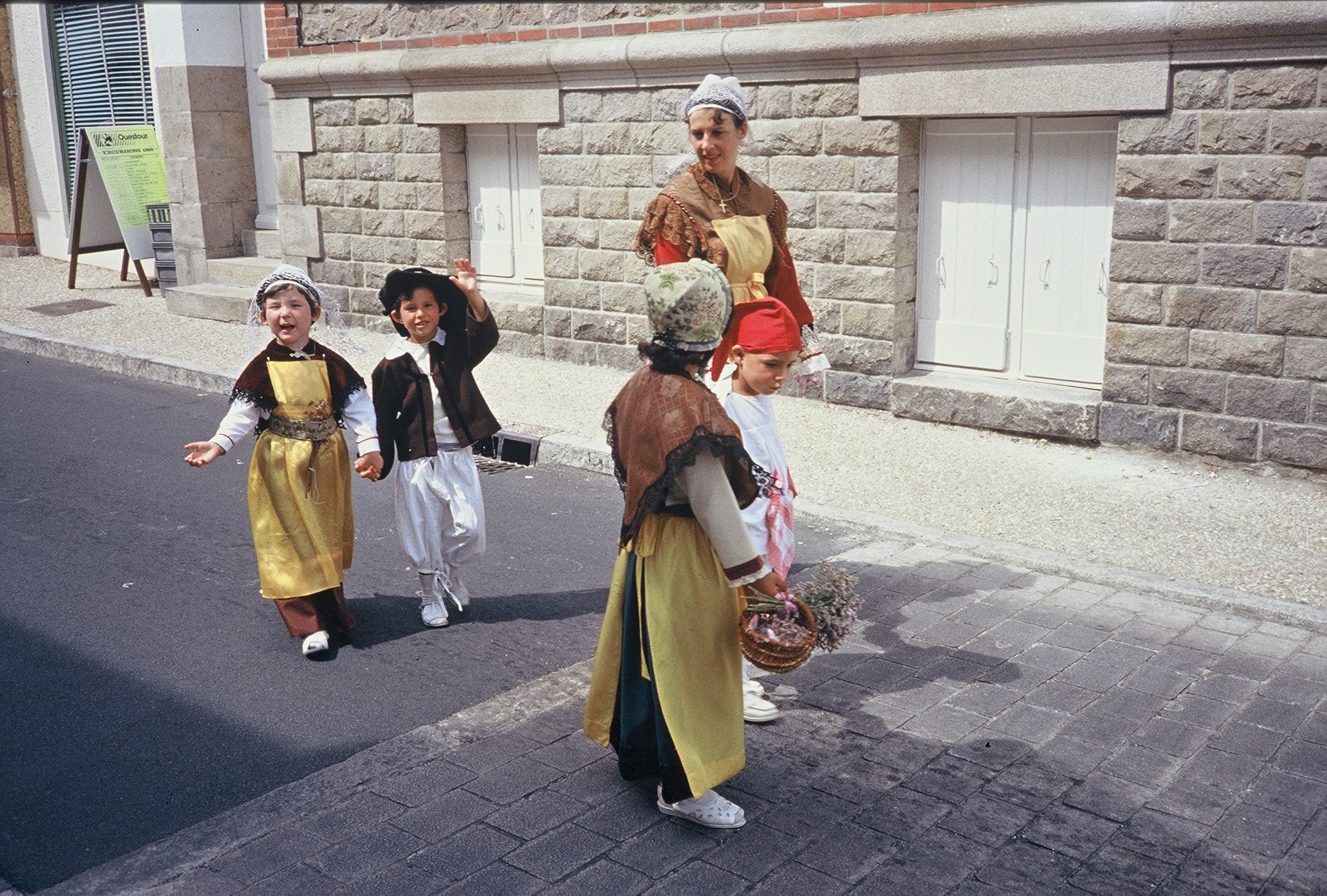 Batz-sur-Mer (Loire-Atlantique, France) - défilé du Pardon.